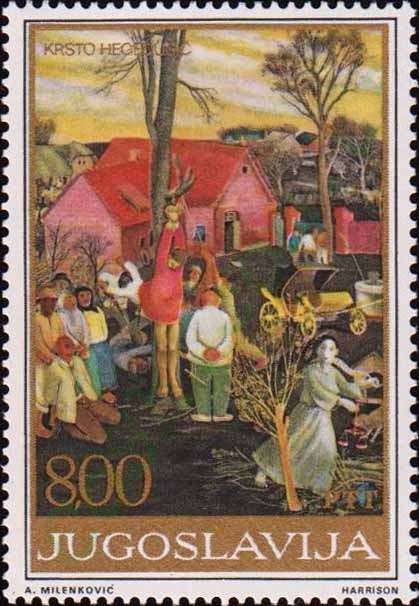 "Правосудие". Крсто Хегедушич (1901-1975)